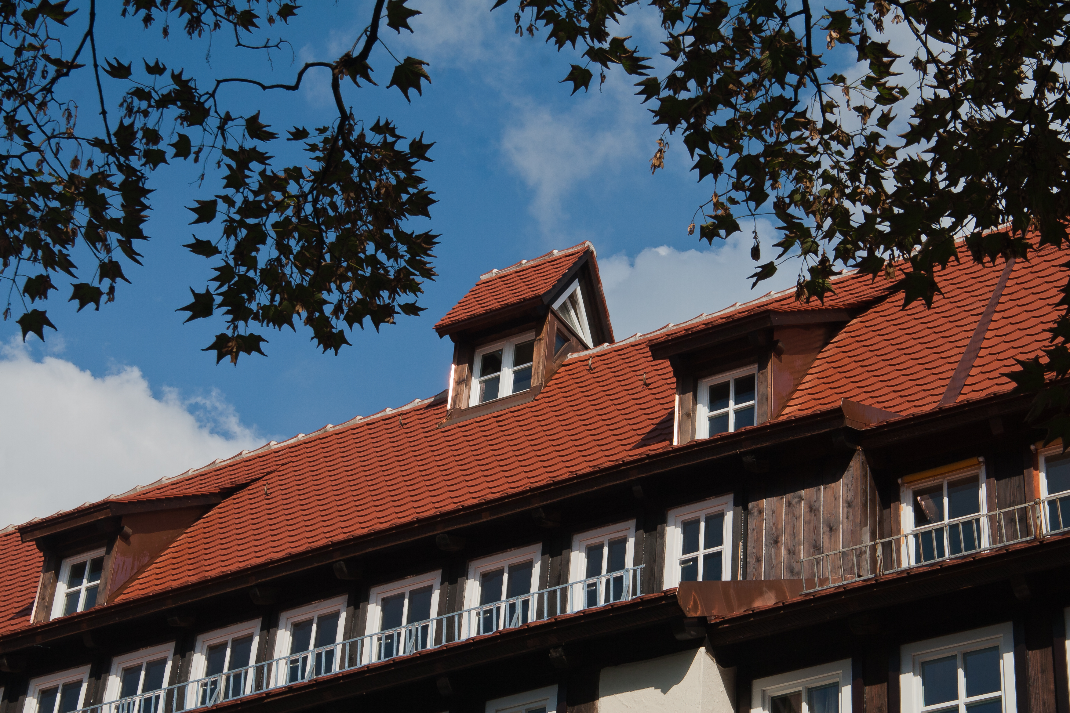 Ulm, Baden-Württemberg, Germany